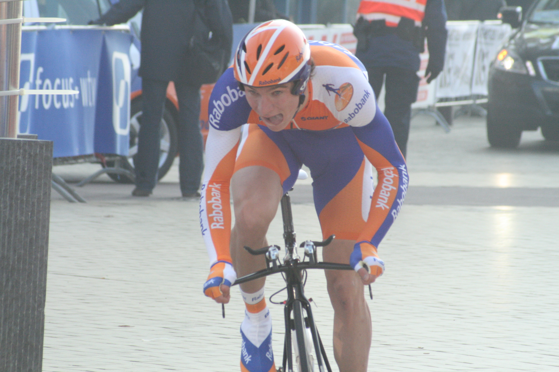 Driedaagse van West-Vlaanderen 2011, proloog in Middelkerke